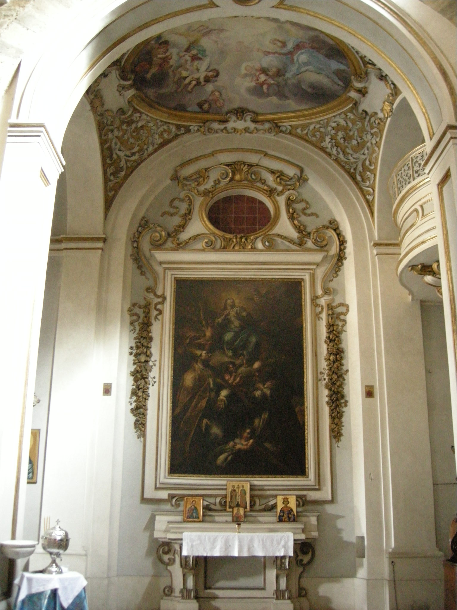 San Jacopo Soprarno, interno, altare dx 1 sebastiano galeotti, madonna in gloria